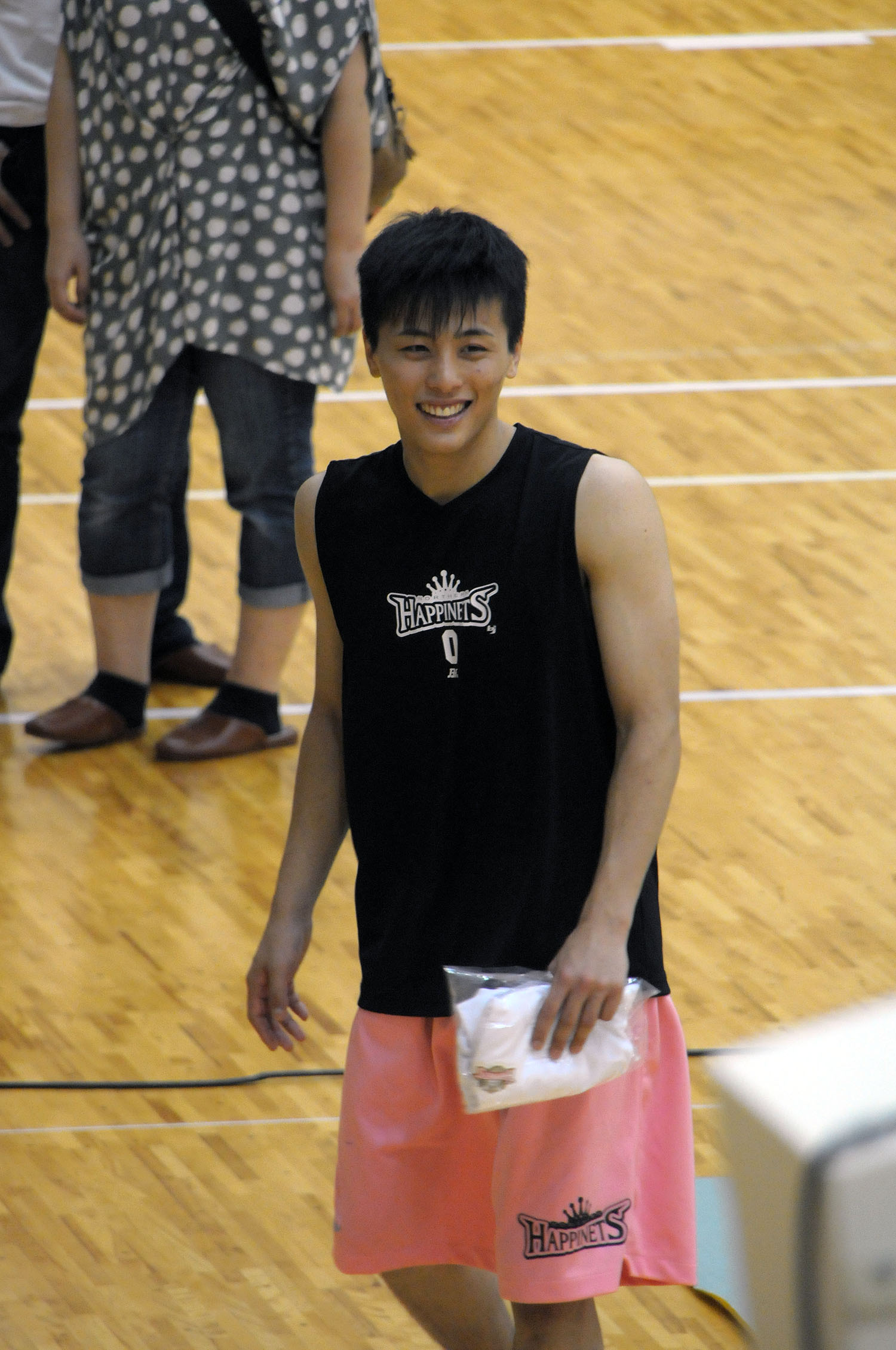 秋田ノーザンハピネッツ、富樫勇樹選手。琴丘総合体育館で。